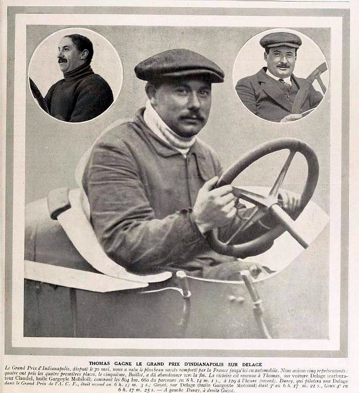 René Thomas vainqueur des 500 miles d'Indianapolis (La Vie au Grand Air, 6 juin 1914, p.499)